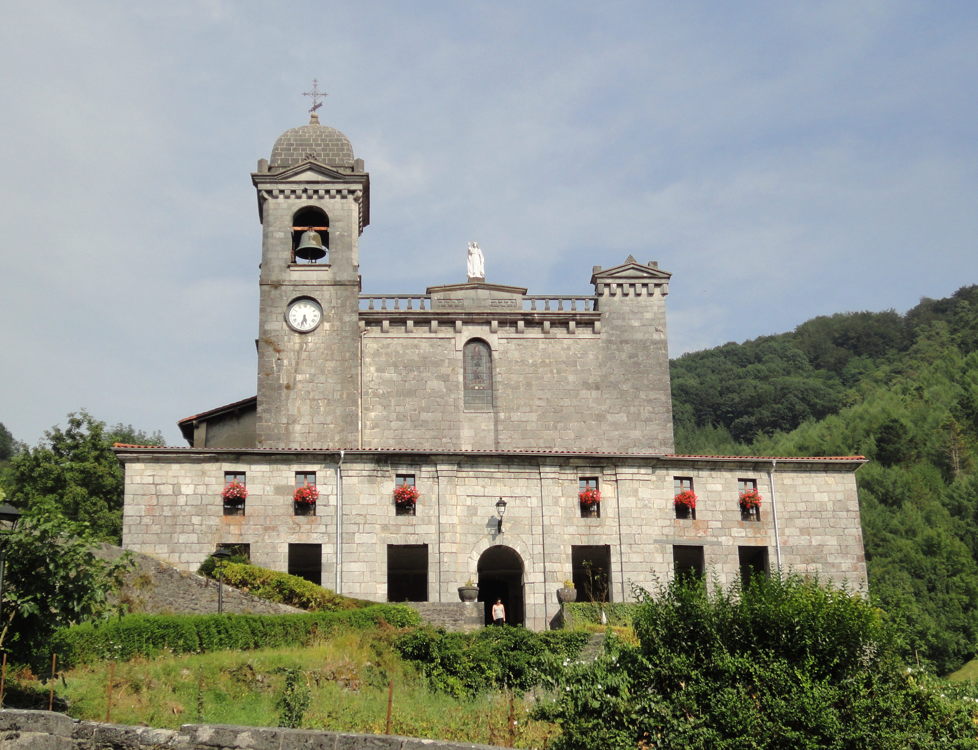 San Migel eliza - Leitza